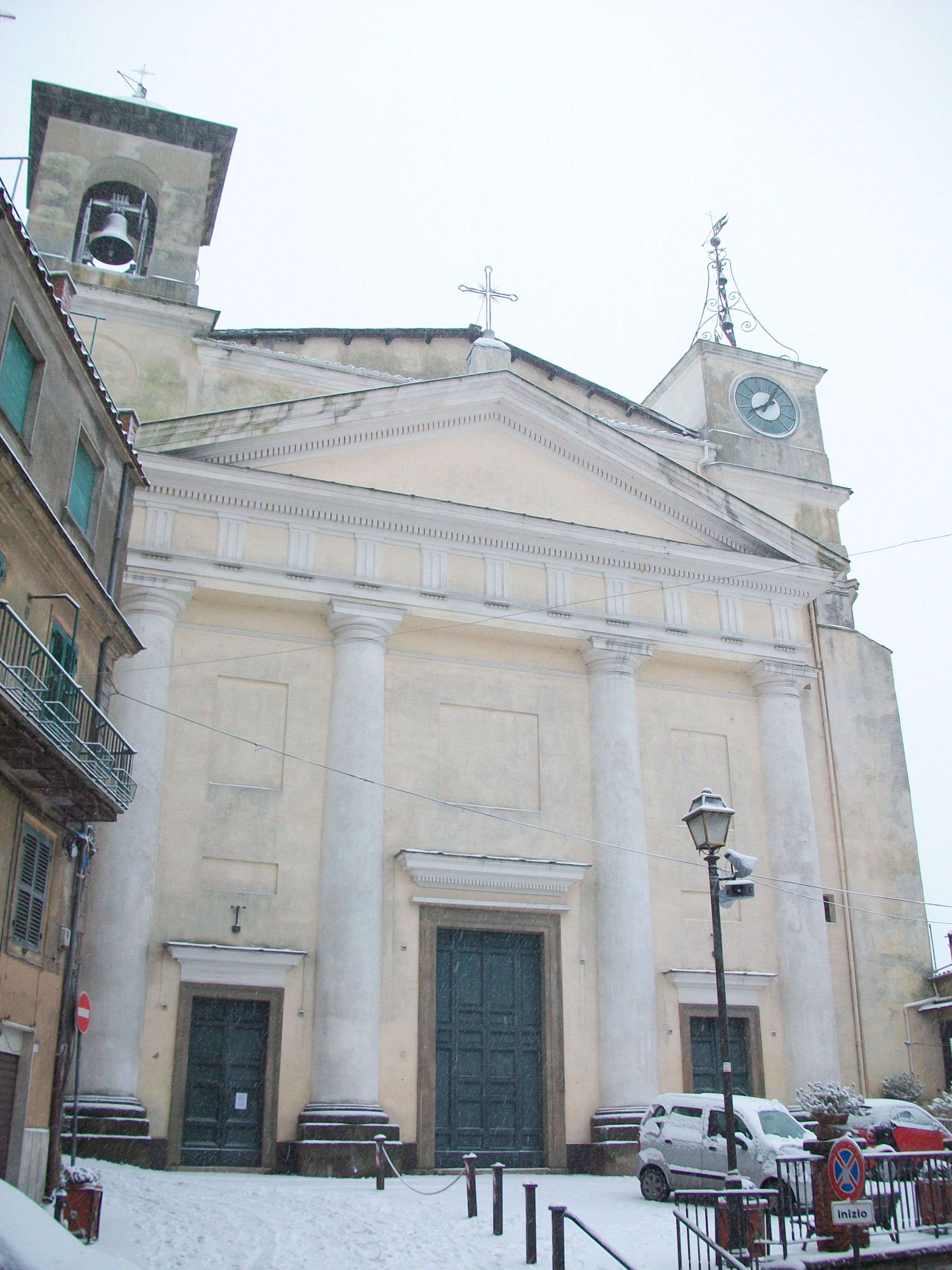 Facciata della Chiesa di Santa Maria Assunta in Cielo, Rocca di Papa